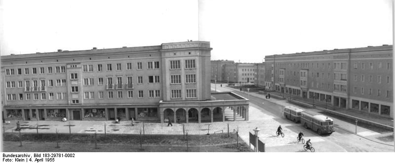 Eisenhüttenstadt, Straße der Jugend, John-Schehr-Straße Zentralbild Klein Hein-Schä 4.4.1955 Eisenhüttenstadt Blick in die Straße der Jugend (rechts) und auf die Ladenzeilen an der John-Schehr-Straße (links).aufgenommen Ende März 1955 2.tlg.Panorama.